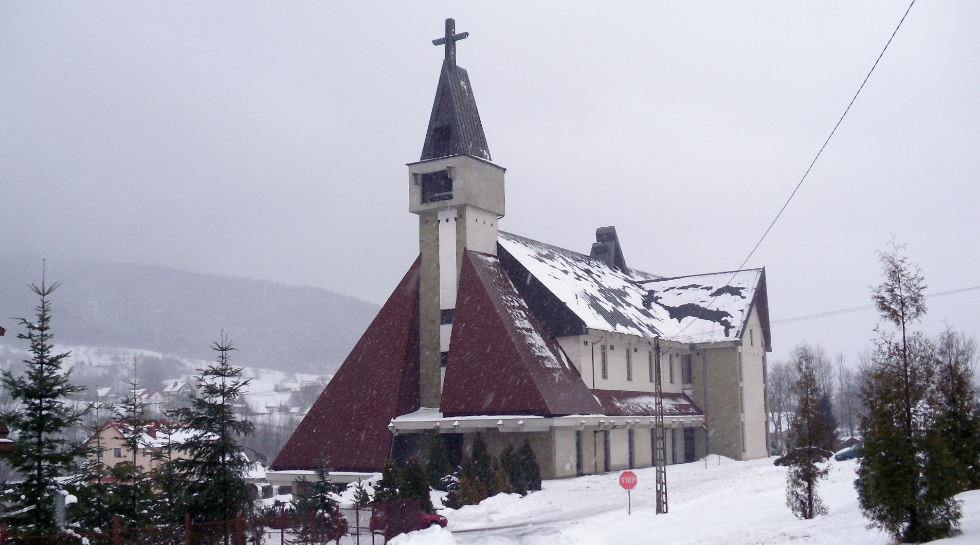 Kasina Wielka - kościół MB Częstochowskiej w Parafii św. Marii Magdaleny.